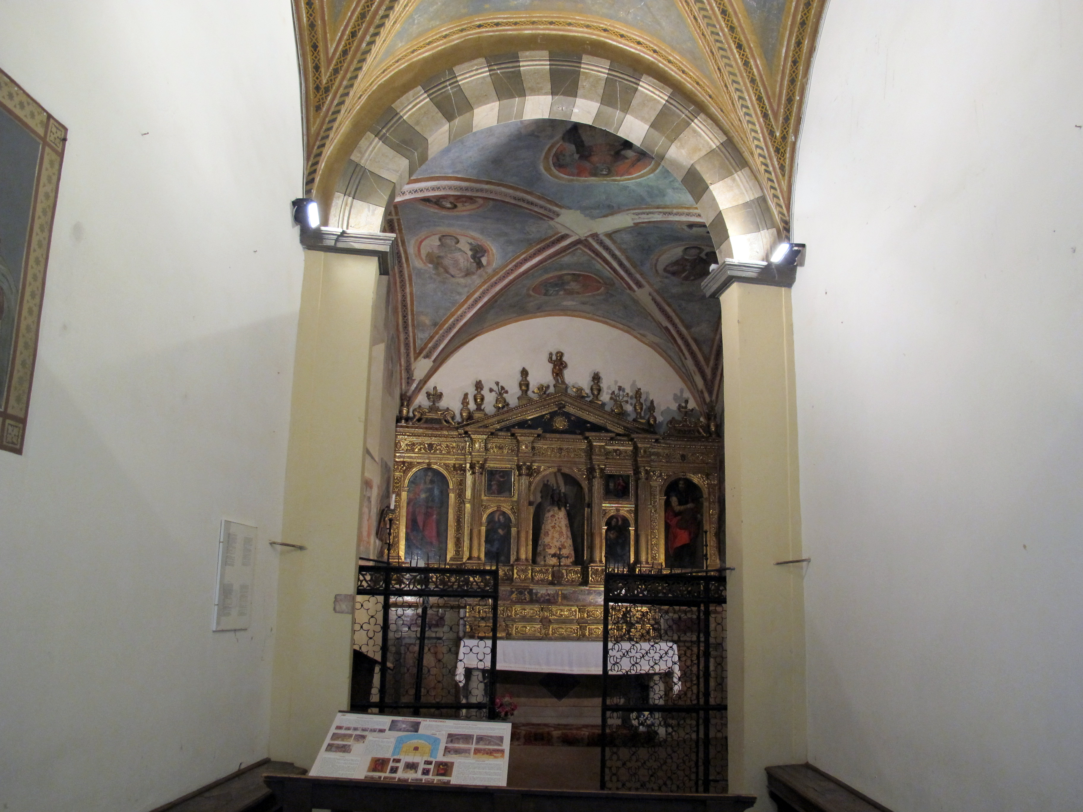 San Miniato